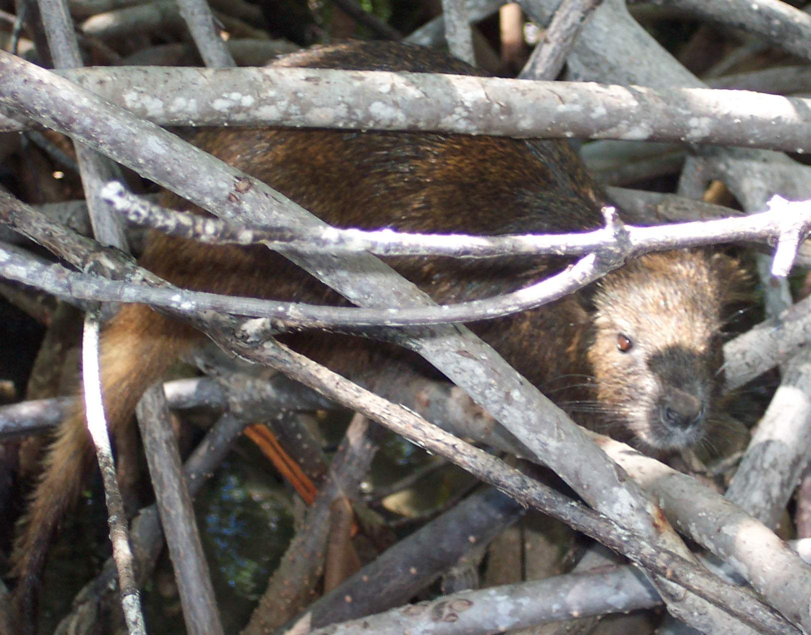 Demarest's_Hutia, Capromys pilorides near Morón, Cuba